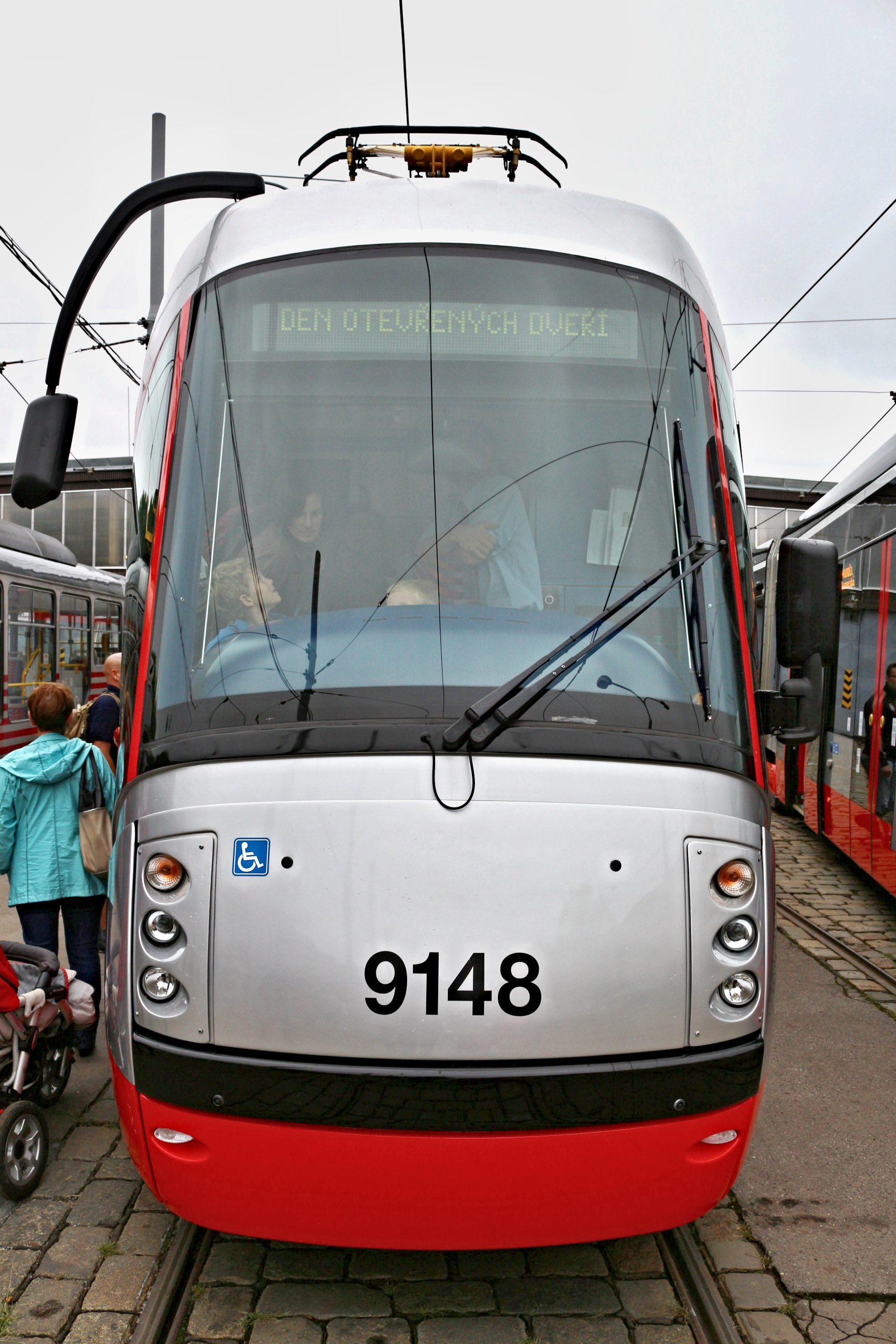 Tramvaje v Praze